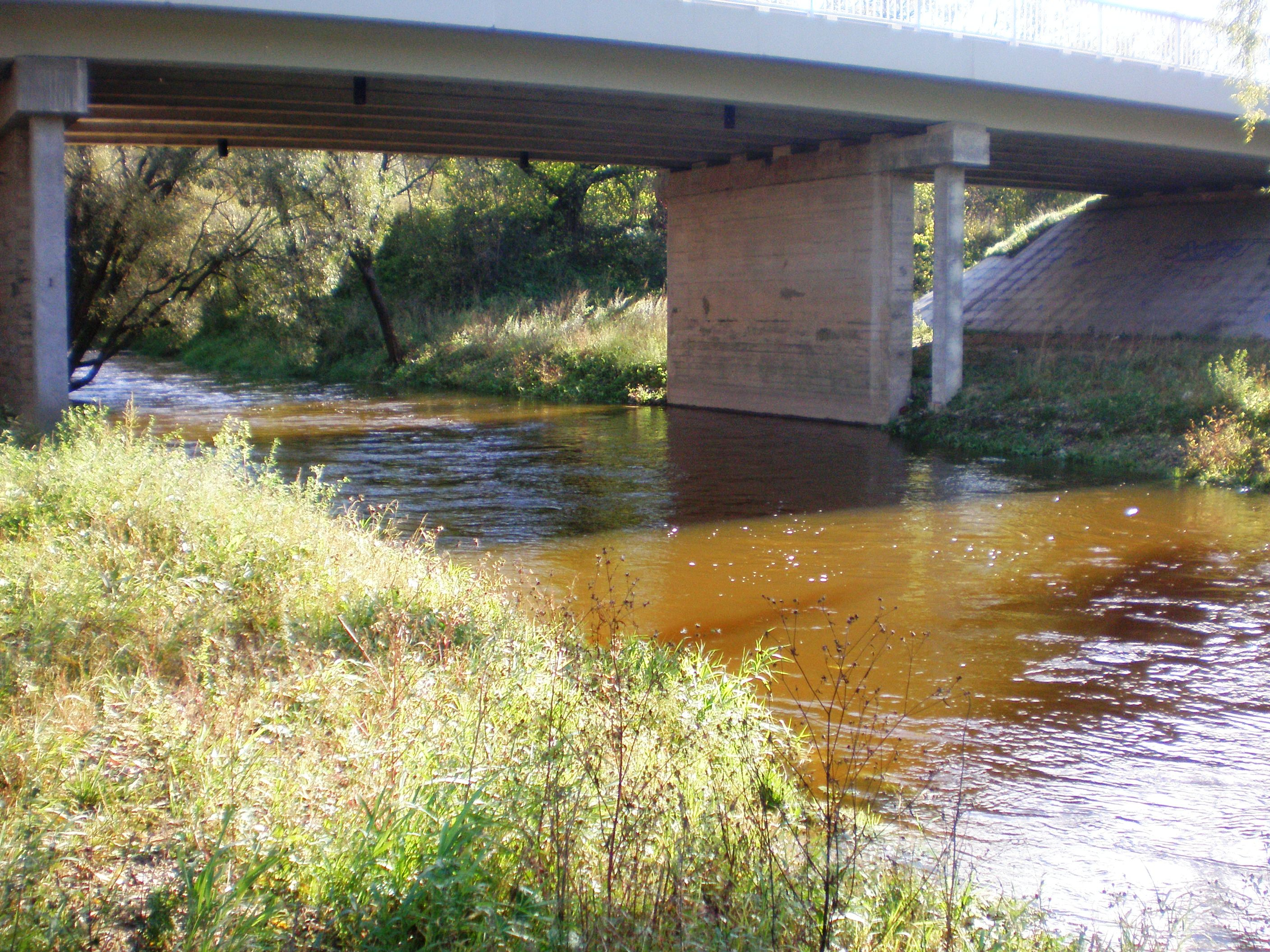 Obelis river near Kėdainiai